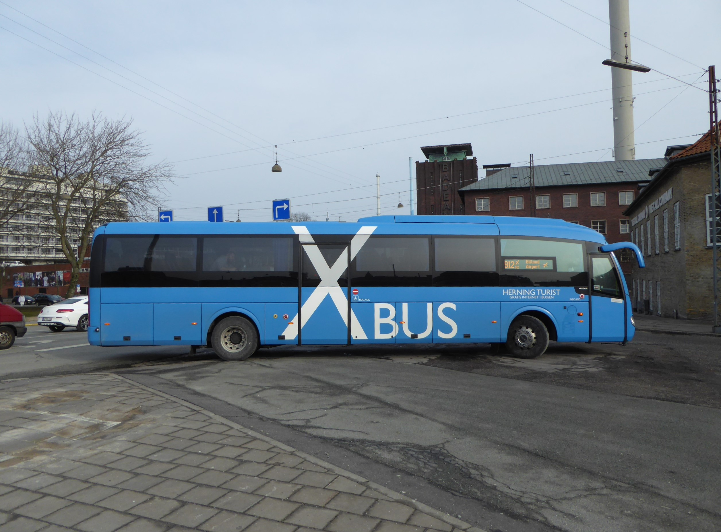 Midttrafik bus line 912X at Aarhus Rutebilstation in Denmark.